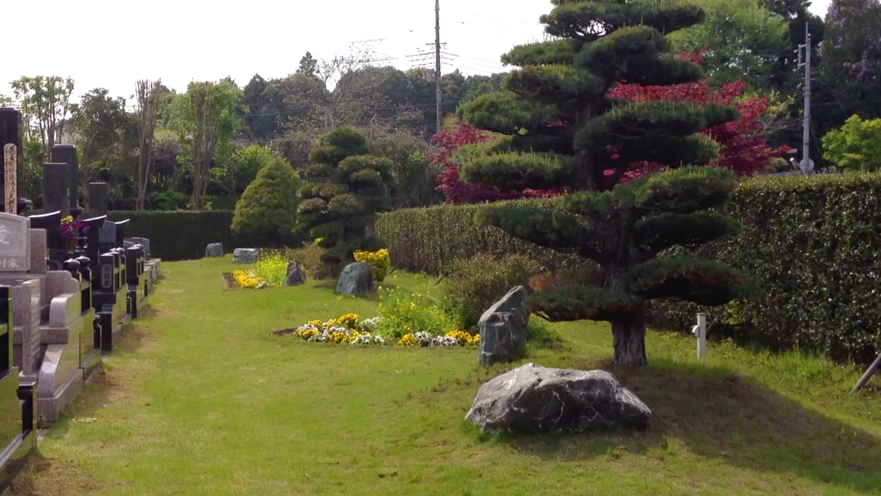 千葉霊園 南無の郷霊園の緑地公園エリア